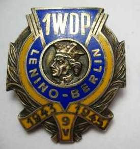 Odznaka 1 Warszawskiej Dywizji Piechoty